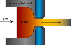 תהליך של ייצירת שחיל